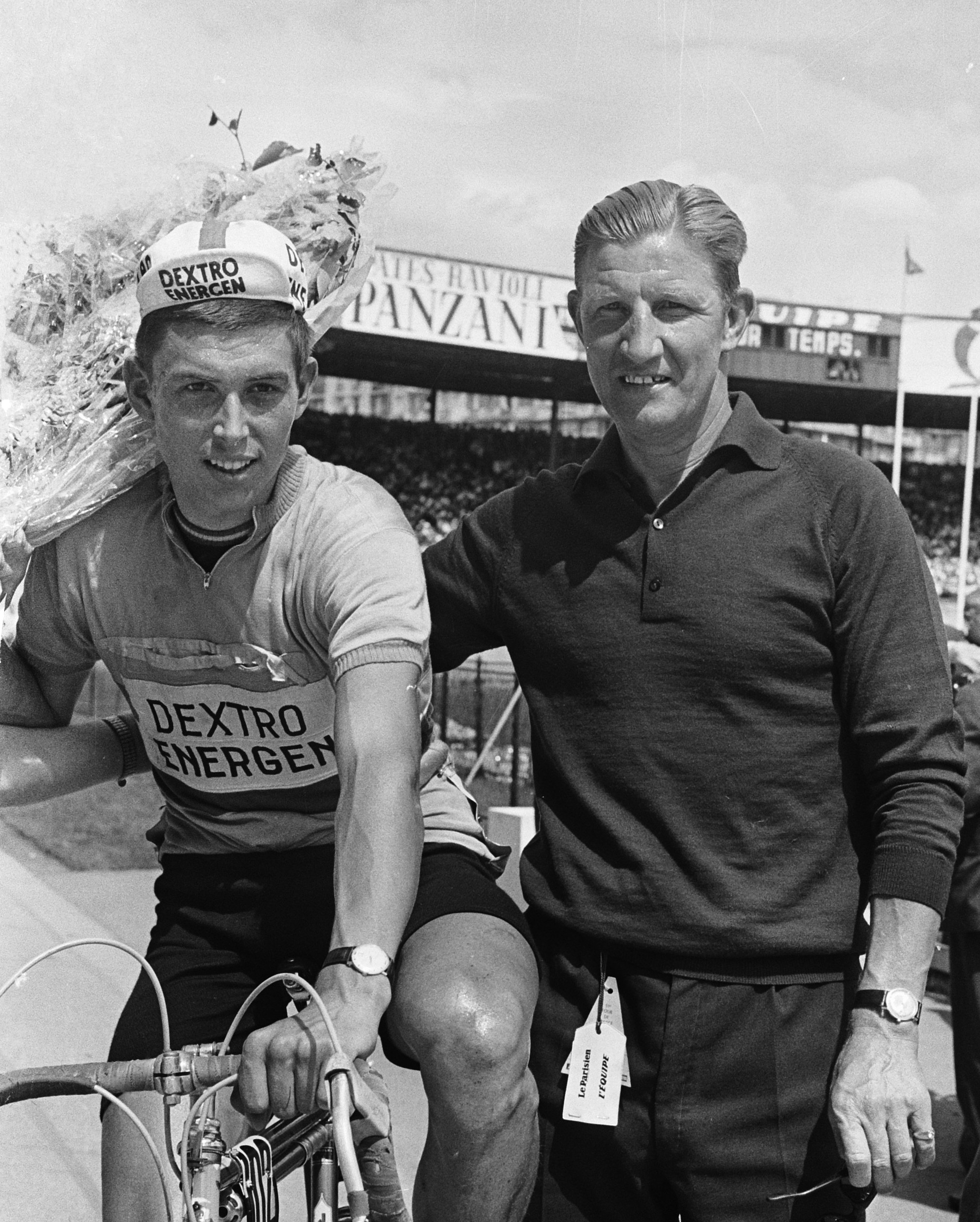 Tour de l'Avenir aankomst in Parijs. Gerben Karstens, winnaar laatste etappe met ploegleider Gerrit Schulte